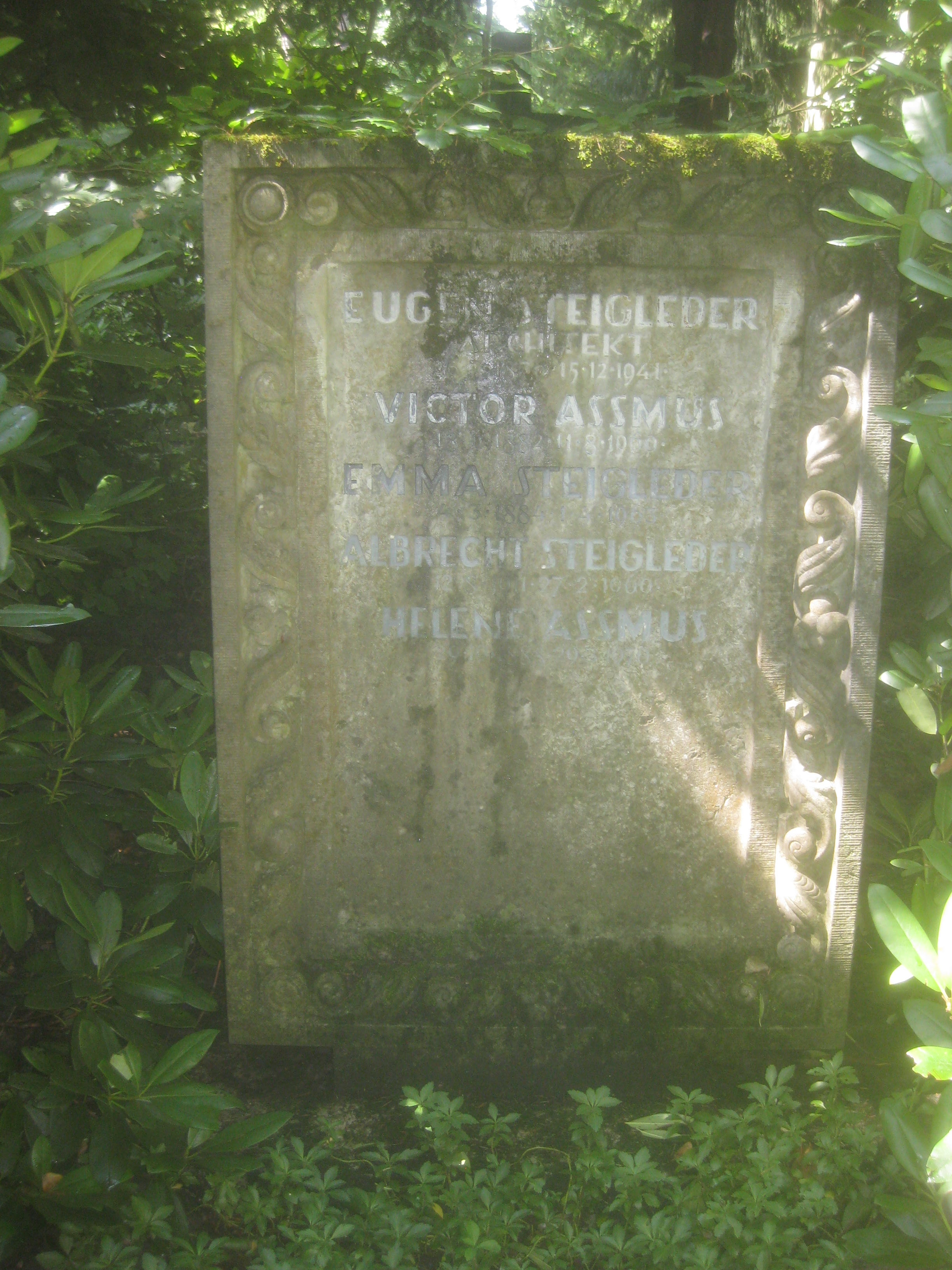 Grab von Eugen Steigleder, Stuttgart, Waldfriedhof Stuttgart, Abteilung 09 h.